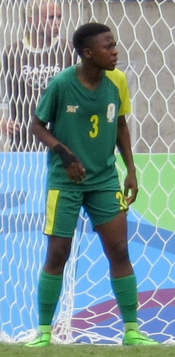 Futebol feminino Suécia 1 x0 Africa do Sul 03/08/16